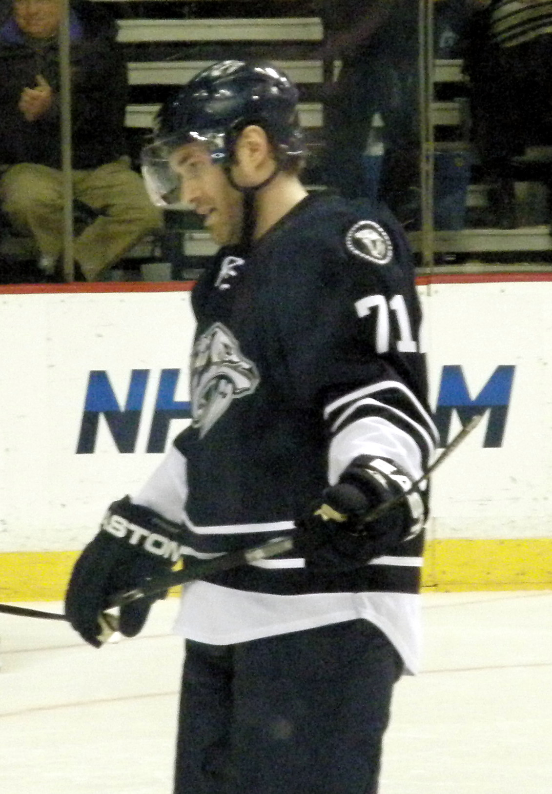 Jean-Pierre Dumont